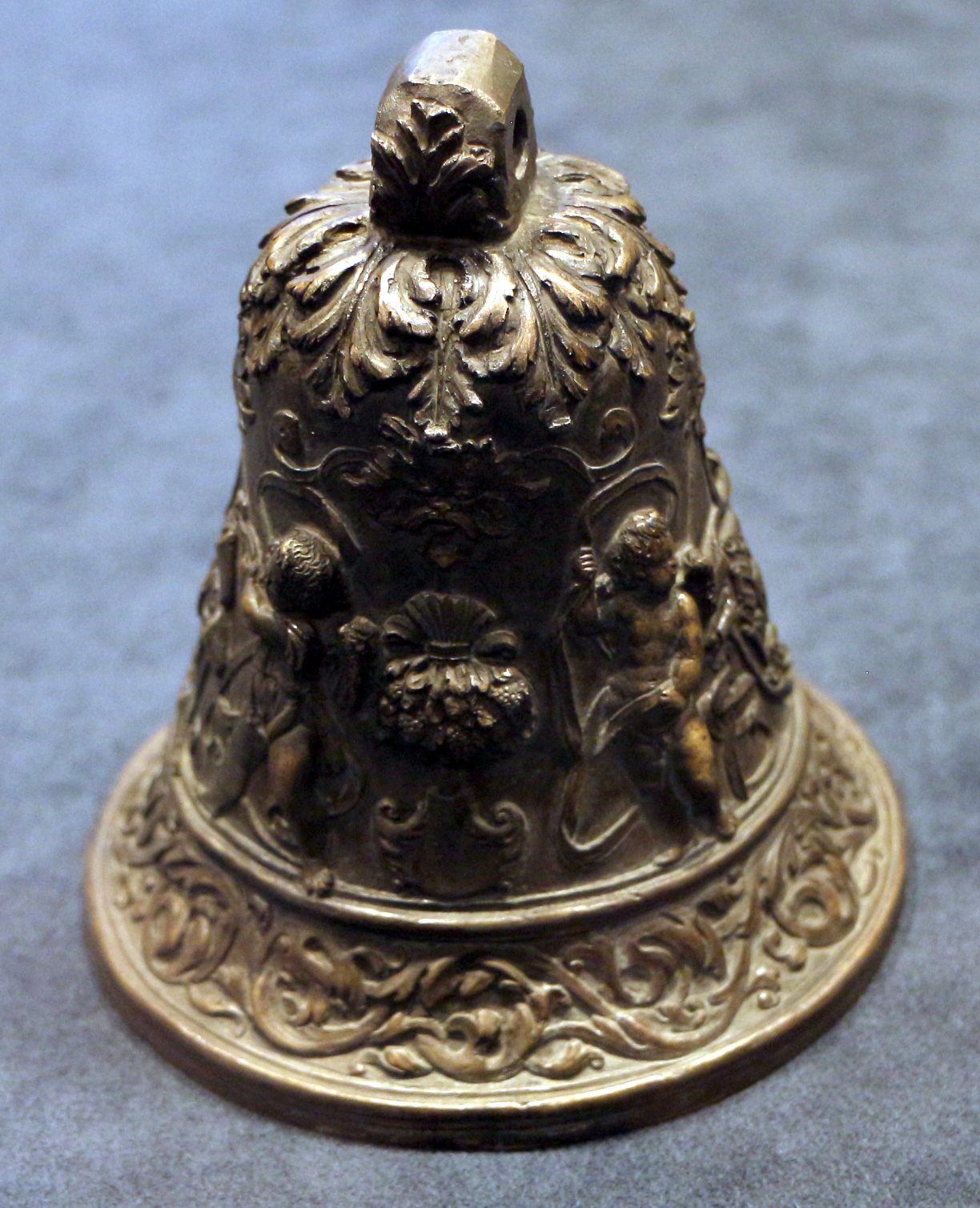 Palazzo Pretorio (Museo Diocesano Tridentino) This is a photo of a monument which is part of cultural heritage of Italy.